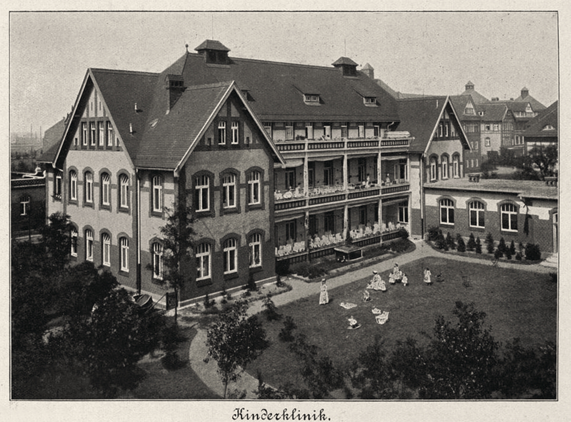 Allgemeine städtische Krankenanstalten, Kinderklinik, Foto von 1908